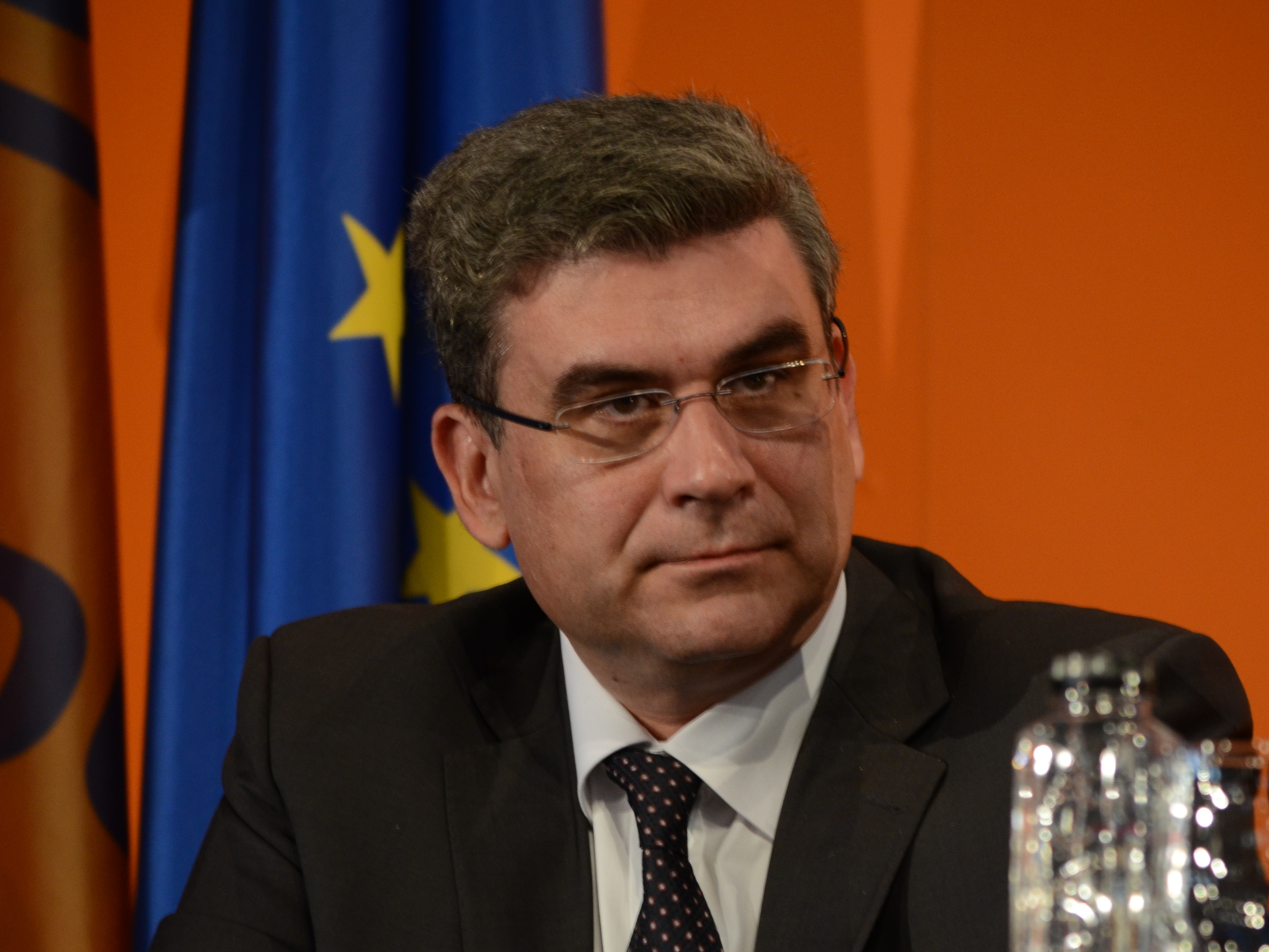 Teodor Baconschi (la Convenția națională extraordinară a Partidului Democrat-Liberal, 23 martie 2013)